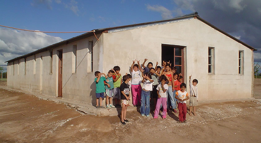 Centro Comunitario La Curva, de la Fundación Misión Esperanza, presidida por la Hermana Theresa Varela